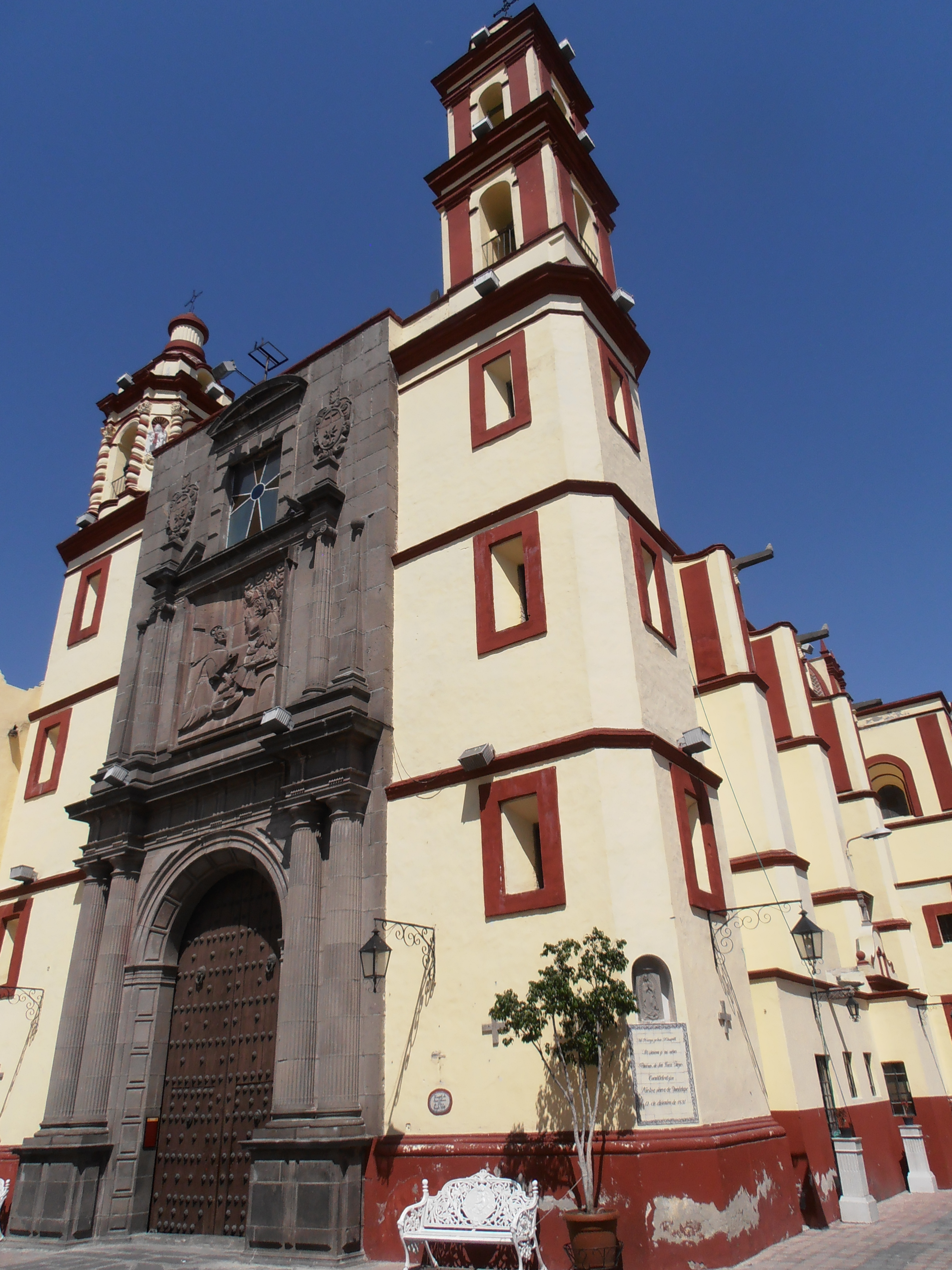 Fachada de la Iglesia de San Juan de Dios